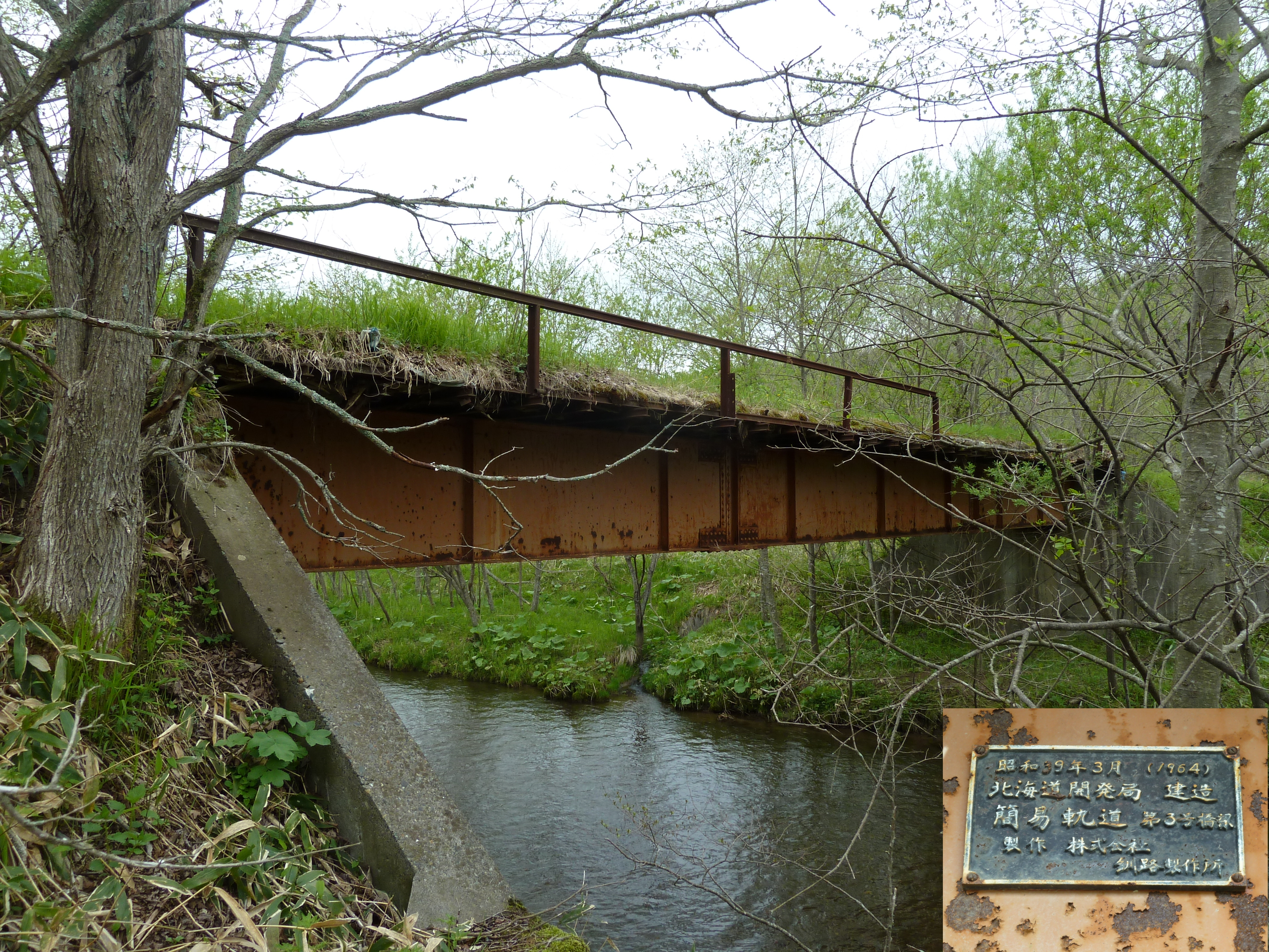 標茶町営軌道沼幌支線跡に残る、第3号橋梁の側面。